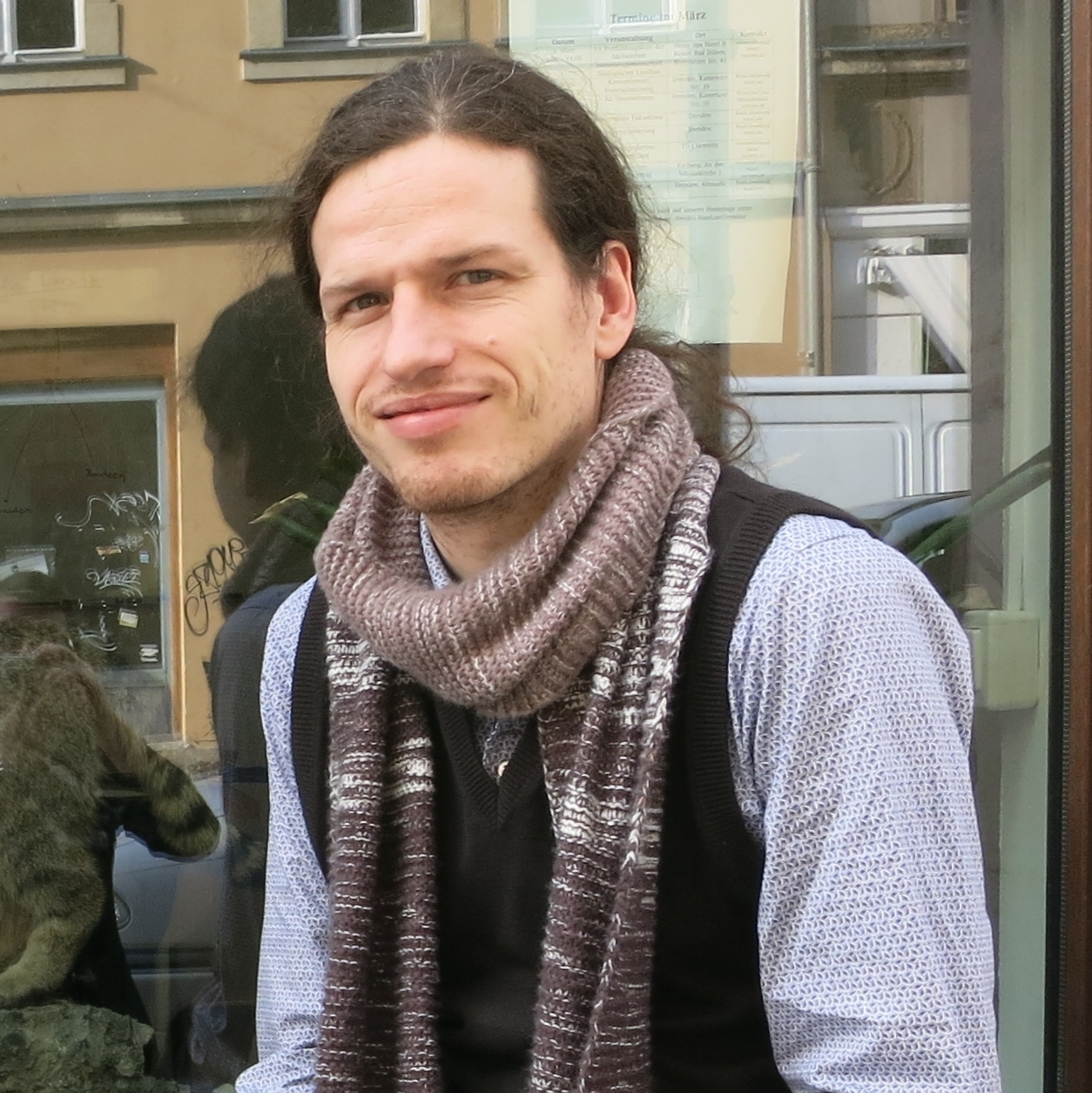 Jürgen Kasek